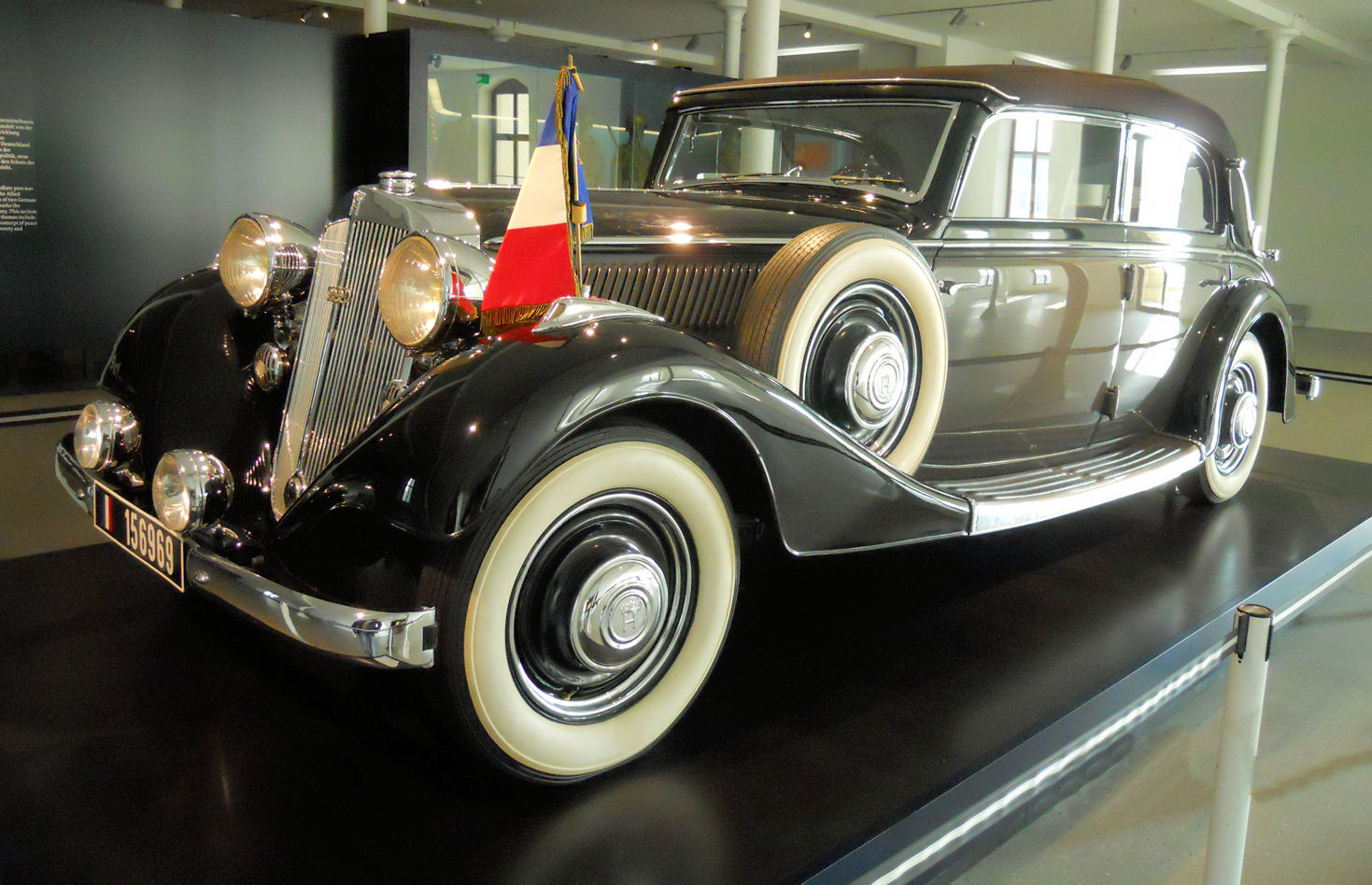 Horch 830 im Militärhistorischen Museum Dresden, benutzt von Charles de Gaulle Beschreibung auf Museumstafel: Charles de Gaulle, General der französischen Befreiungsarmee und später Staatspräsident in Frankreich, verwendete dieses Fahrzeug seit Ende des Zweiten Weltkrieges bis zu seiner Präsidentschaft 1959. Es stammt vermutlich aus dem Fuhrpark von General Dietrich von Choltitz, der ab August 1944 Stadtkommandant im besetzten Paris war und den Befehl Hitlers nicht befolgte, die Stadt vollständig zu zerstören. De Gaulle nutzte den Horch bei feierlichen Anlässen, wie dem Gedenken an seinen Aufruf zum Widerstand vom 18. Juni 1940, aber auch auf Wahlkampfreisen durch Frankreich. Er sah in der Befehlsverweigerung von Choltitz einen Grundstein für die deutsch-französische Aussöhnung nach dem Krieg.